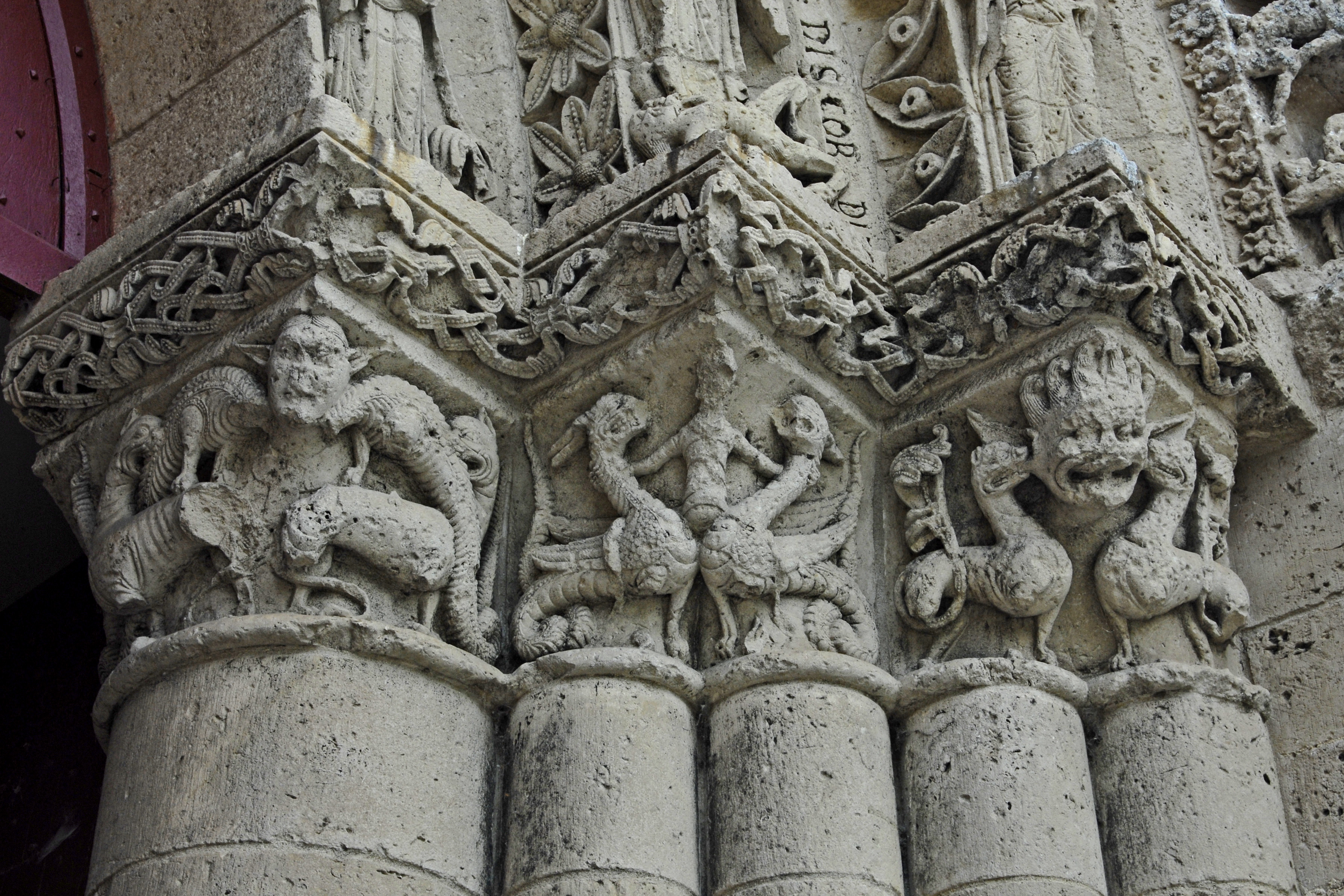 St.-Pierre Aulnay, Hauptportal, Kapitelle rechts vom Hauptportal